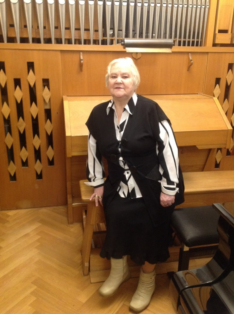 МГК им. П.И. Чайковского, зал им. Н.Я. Мясковского, 2016